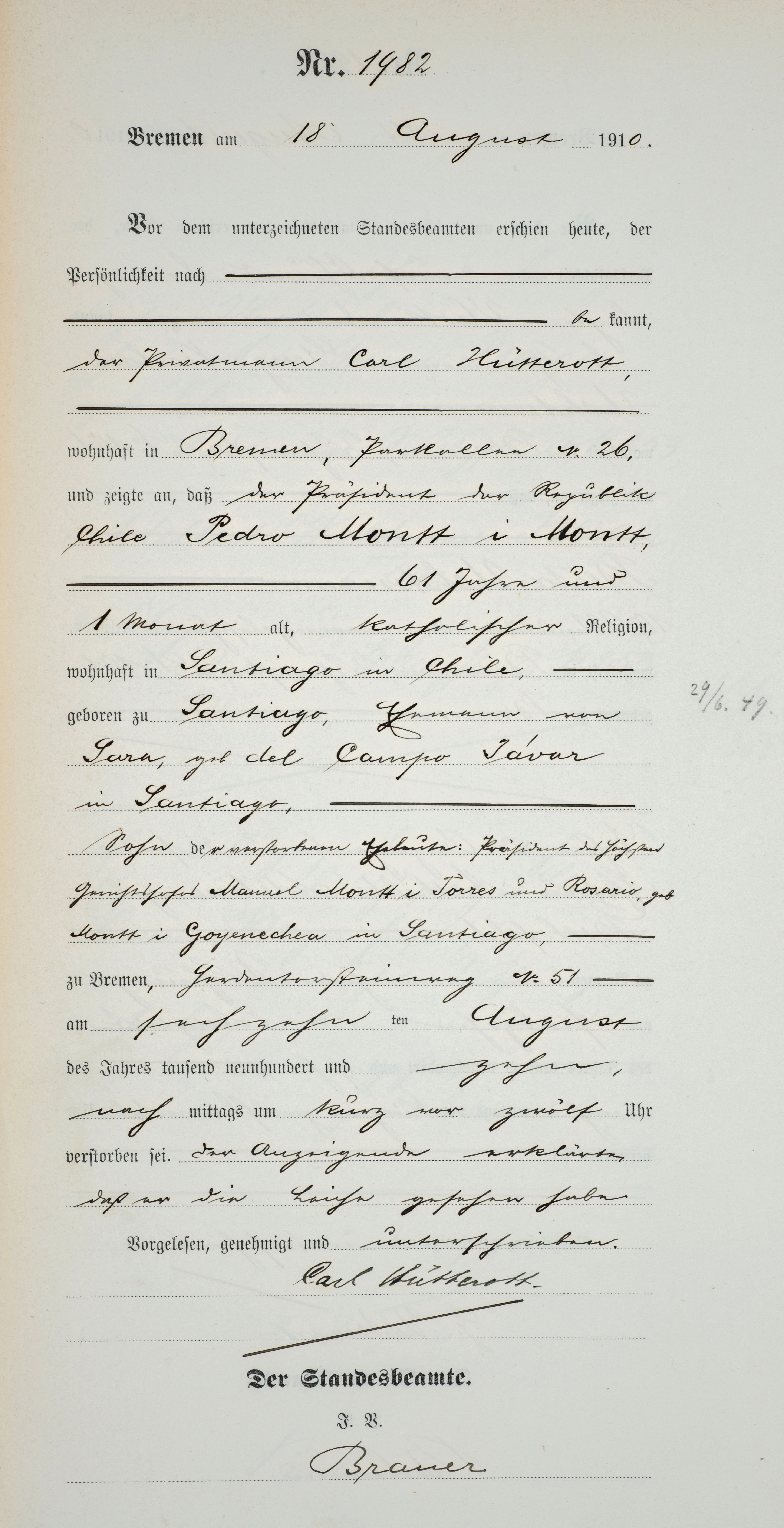 Sterbeurkunde Pedro Montt Montt (* 21. Juli 1849 in Santiago de Chile; † 16. August 1910 in Bremen)